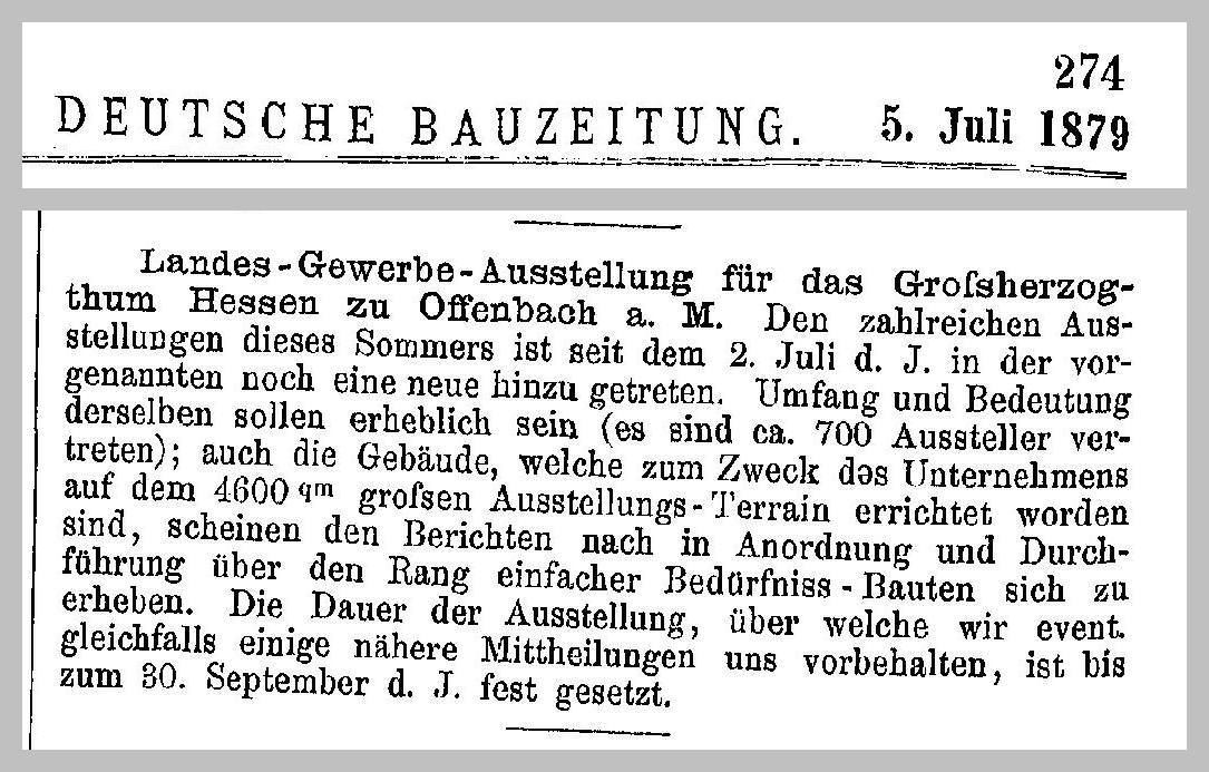 Hessische Landes-Gewerbe-Ausstellung zu Offenbach am Main, Deutsche Bauzeitung vom 5. Juli 1879 (Scherenschnitt)